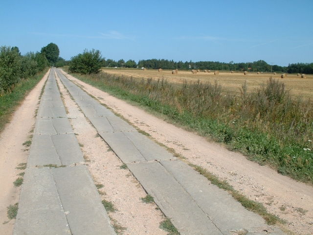 Plattenweg und Strohballen auf der Insel Ummanz nahe Rügen.